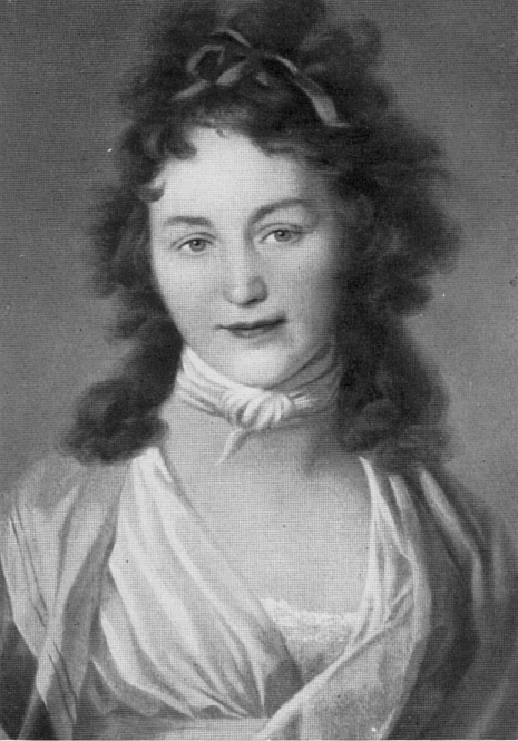 Caroline Schlegel-Schilling, Gemälde in Privatbesitz (1932)